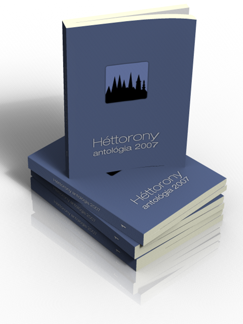 könyvek